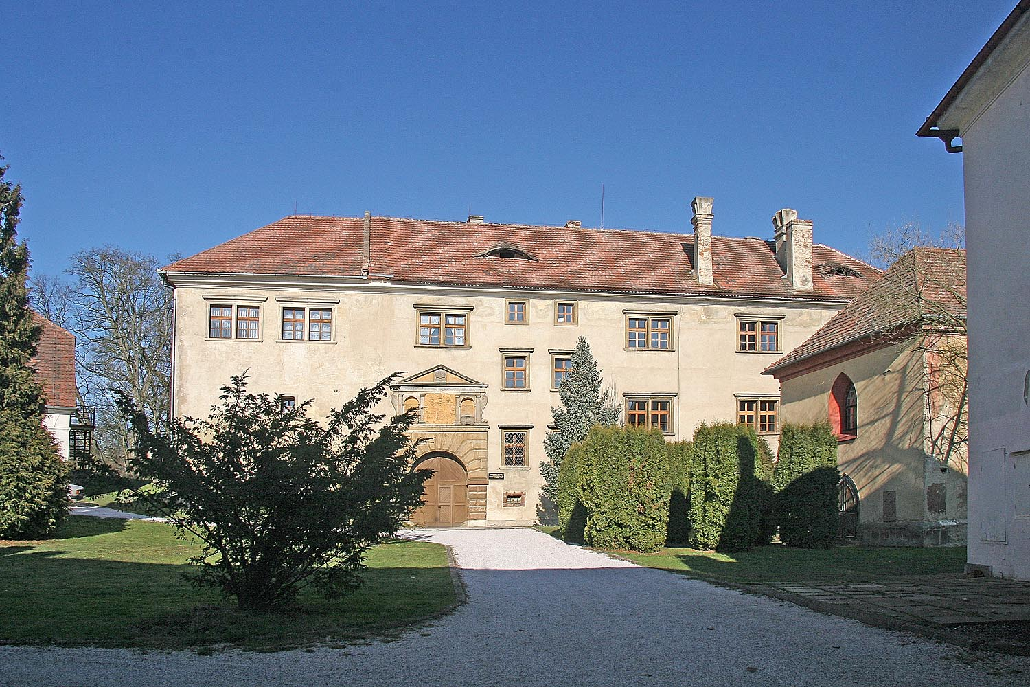 Staré Hrady - zámecké nádvoří, district Jičín autor:Prazak date:17. 2. 2007